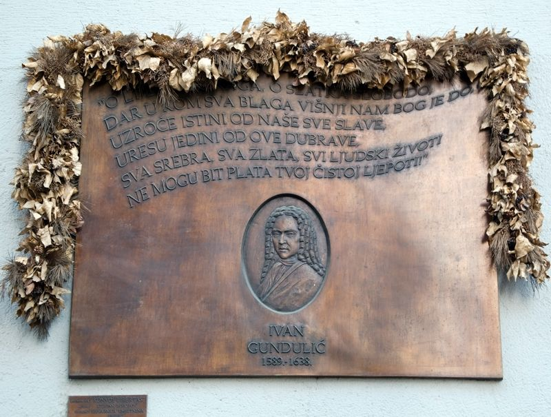 Zagreb